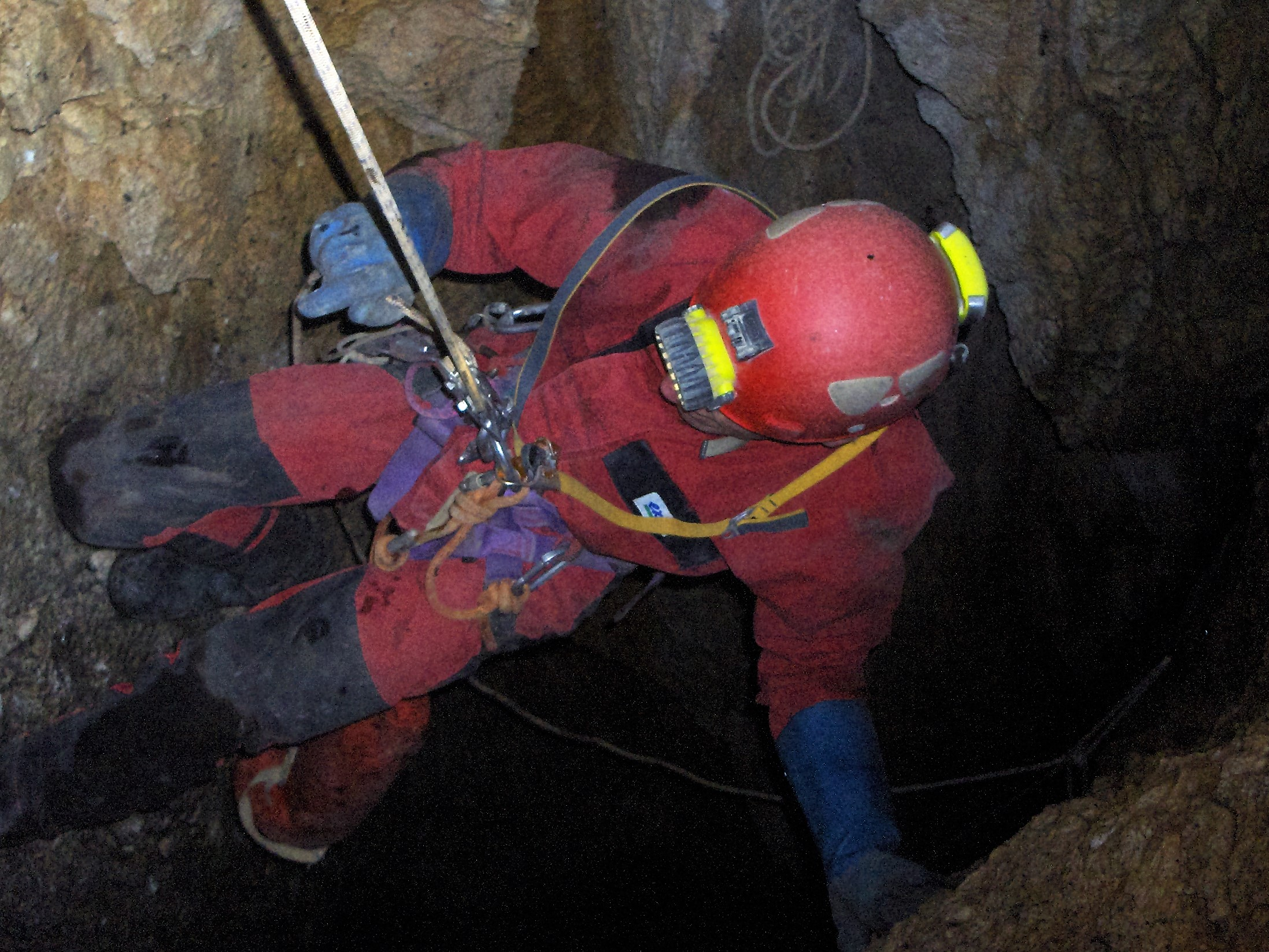 Le P67 du Sonne Automne dans le scialet Jeunesse d'Automne.